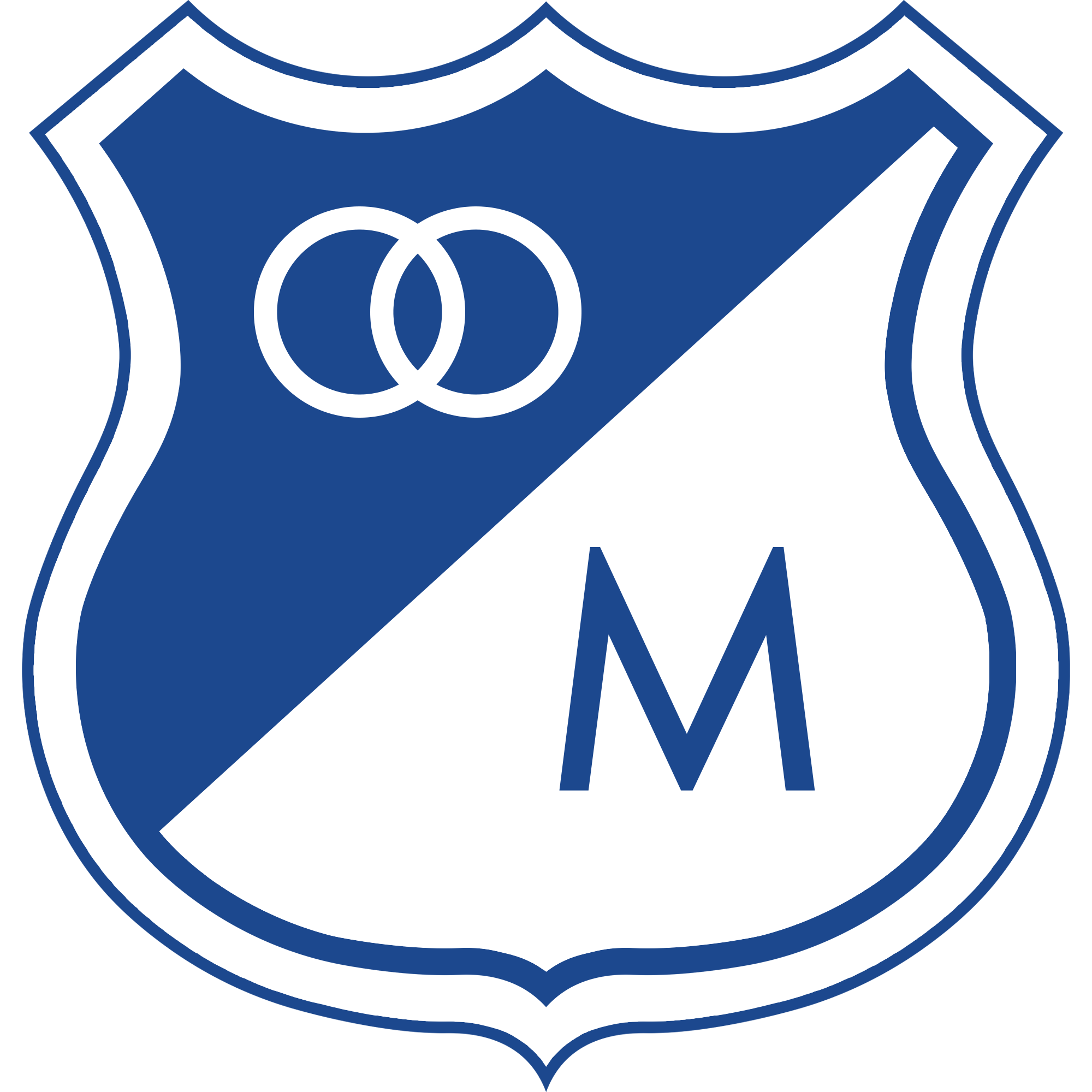 Escudo de Millonarios utilizado oficialmente entre las temporadas 2009 y 2011